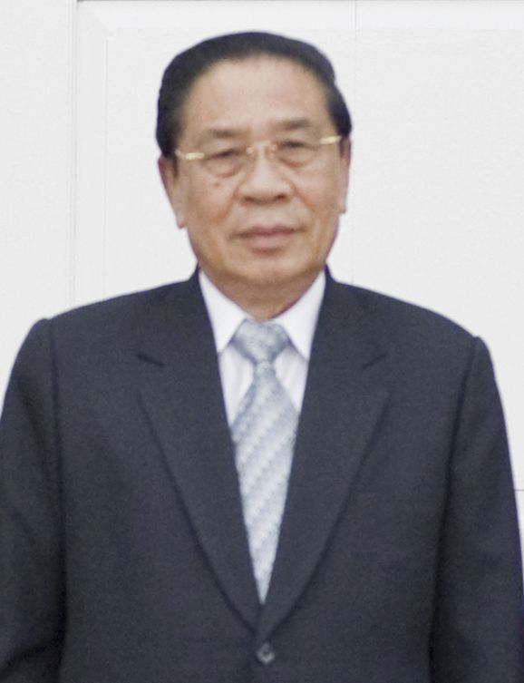 จูมมะลี ไซยะสอน ประธานประเทศลาว / นายกรัฐมนตรี พร้อมคณะ เข้าเยี่ยมคารวะ นายจูมมาลี ไซยะสอน ประธานประเทศแห่งสาธารณรัฐประชาธิปไตยประชาชนลาว ที่สำนักงานประธานประเทศแห่งสาธารณรัฐประชาธิปไตยประชาชนลาว นครหลวงเวียงจันทน์ 9ธันวาคม2552 (The Official Site of The Prime Minister of Thailand Photo by พีรพัฒน์ วิมลรังครัตน์)